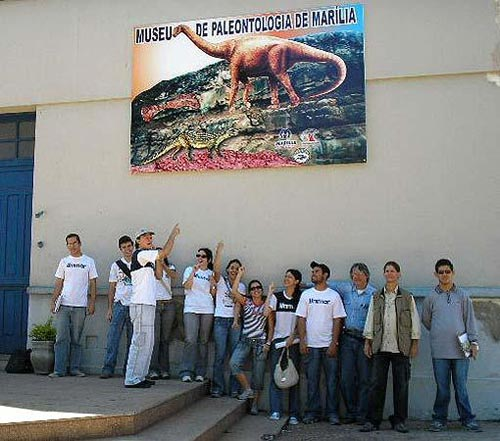 Vista externa do Museu